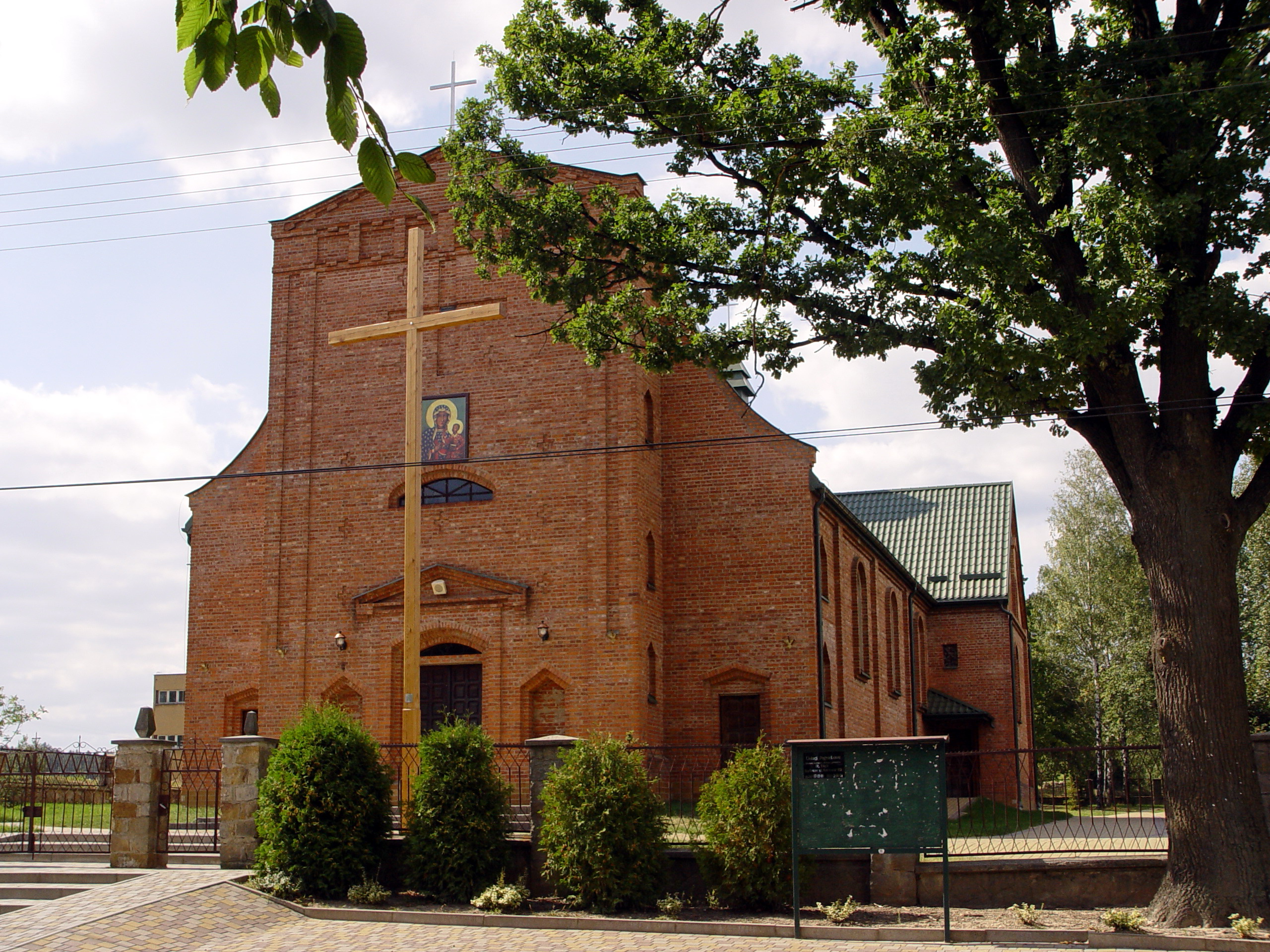 Majdów 26, kościół p.w. Podwyższenia Krzyża świętego